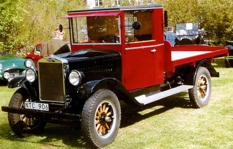 Volvo LV60 Truck 1929